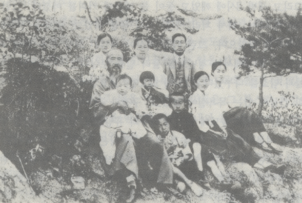 윤치호 가족의 야외 나들이 사진, 1930년